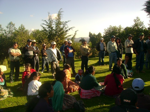 Reunión de pobladores en la Aldes Nimchim